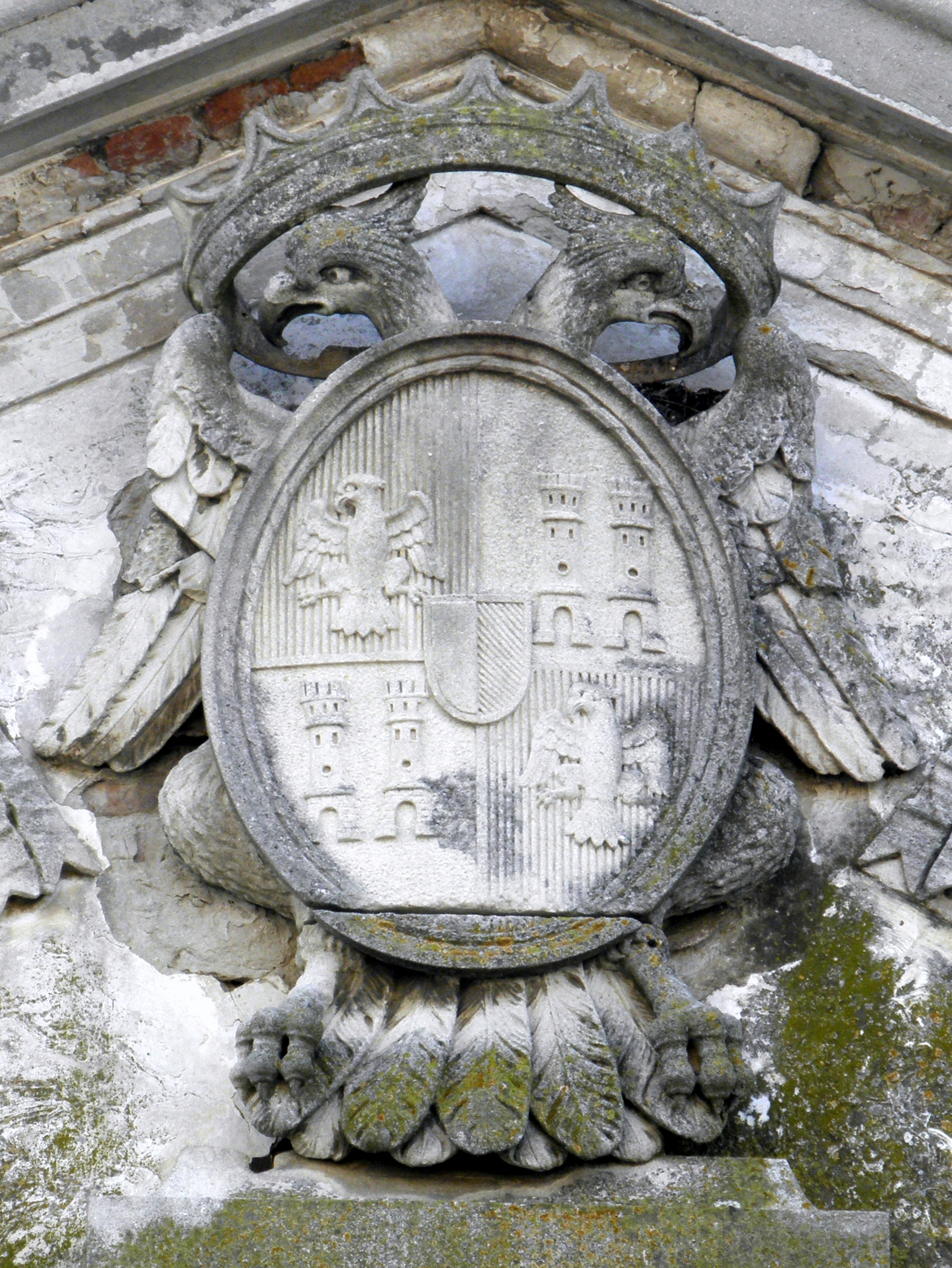 Cartura, Villa De Buzzaccarini: dettaglio facciata, lo stemma familiare presente nel timpano.